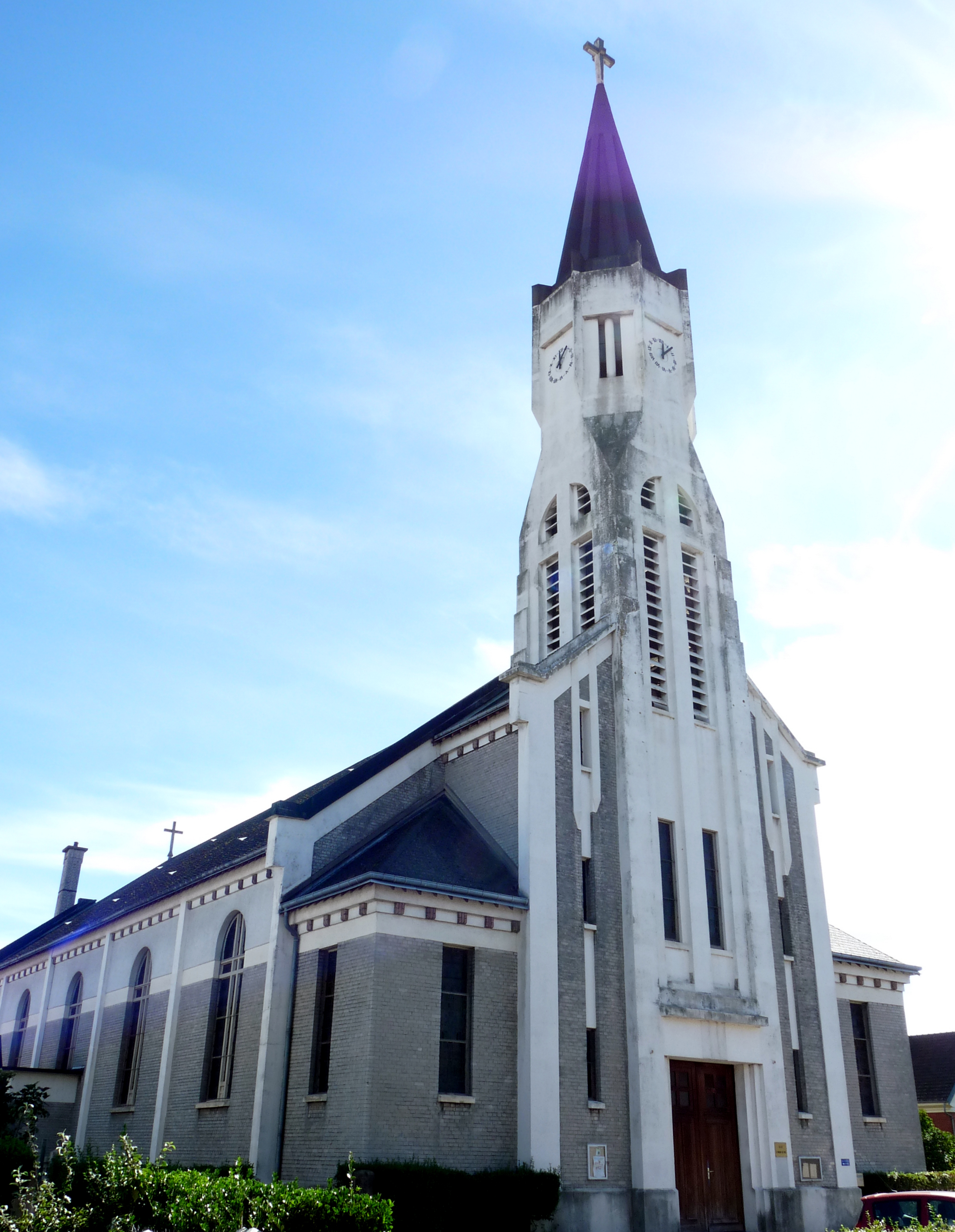 Église Saint-Vincent-de-Paul de Sotteville-lès-Rouen (Inscrit) .